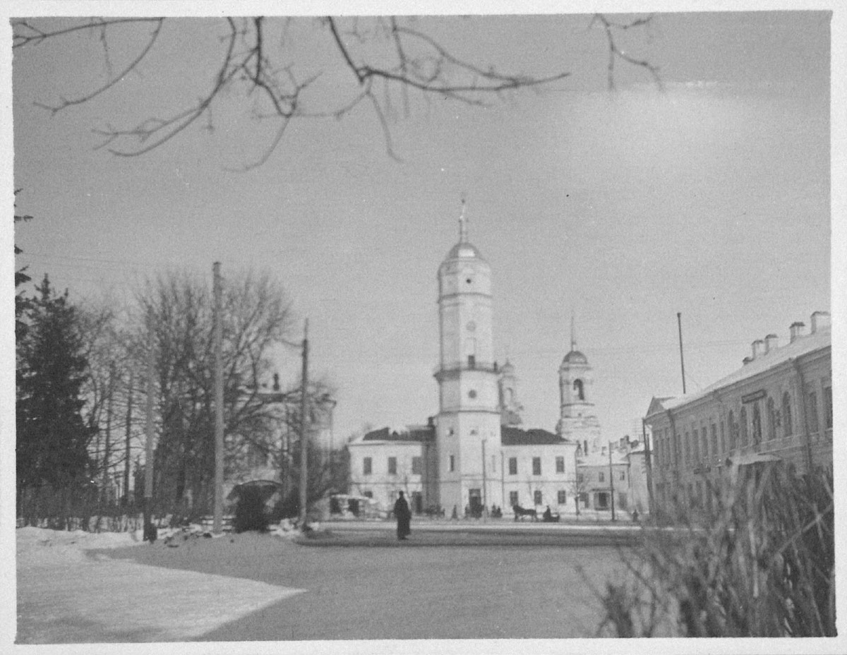 Беларуская (тарашкевіца): Магілёў (Mahiloŭ), пляц Рынак (plac Rynak). Ратуша